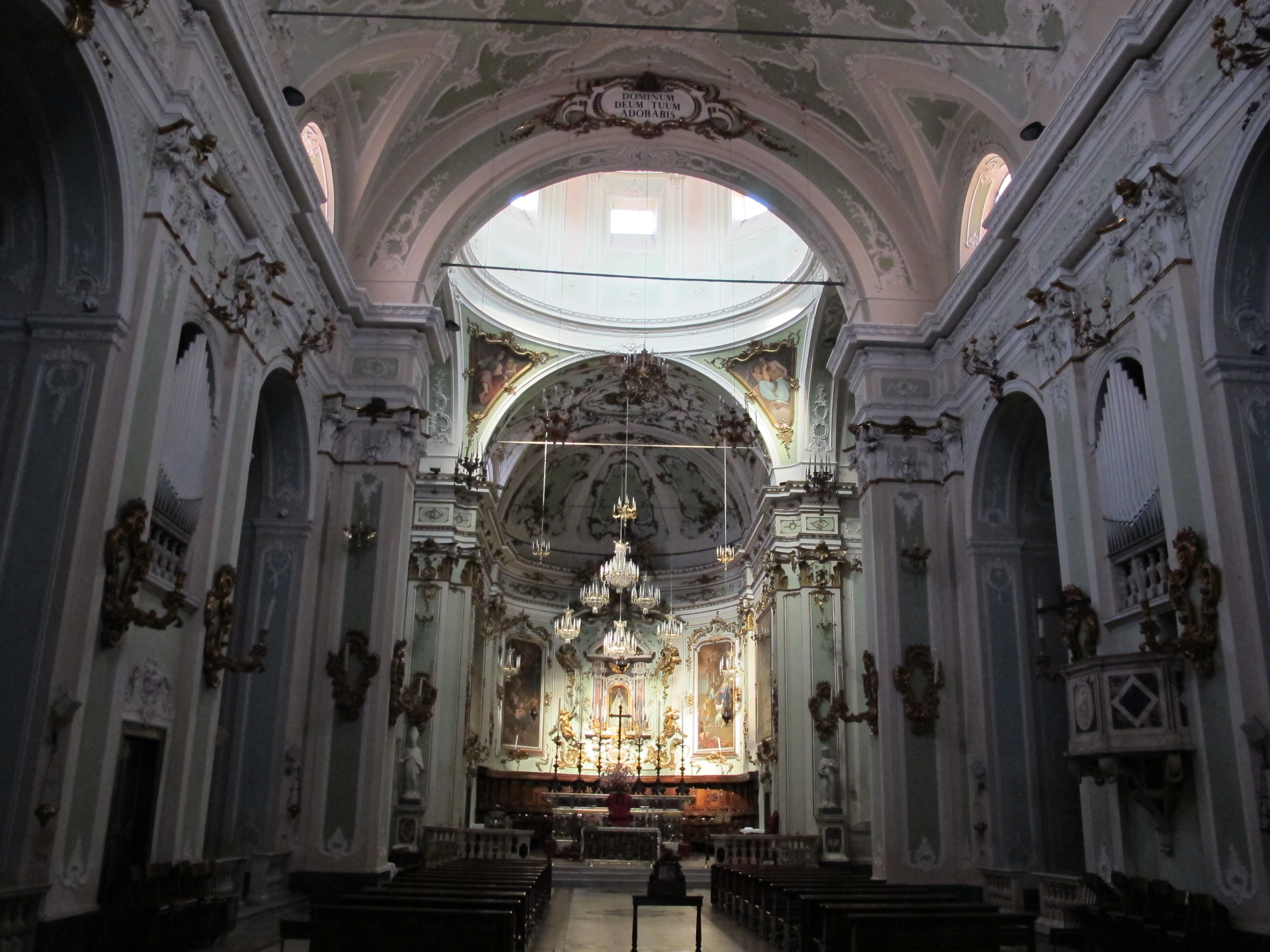 Duomo di pontremoli, interno